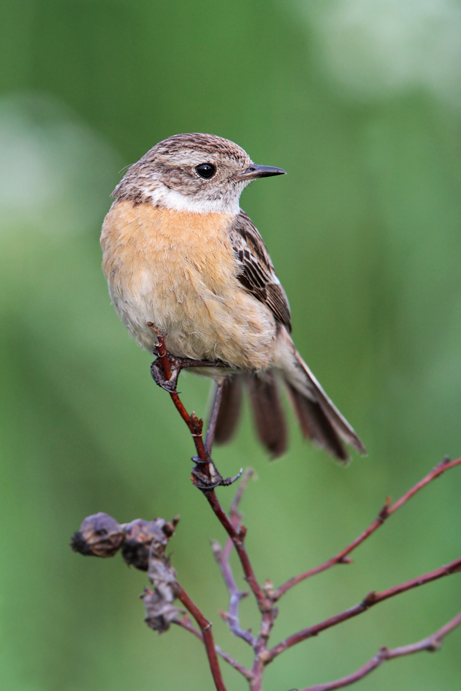 Schwarzkehlchen in der Nähe des Ilkerbruchs